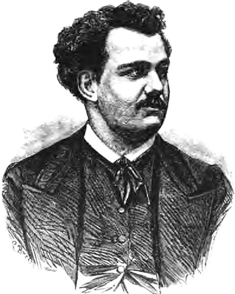 Victor Noir: portrait